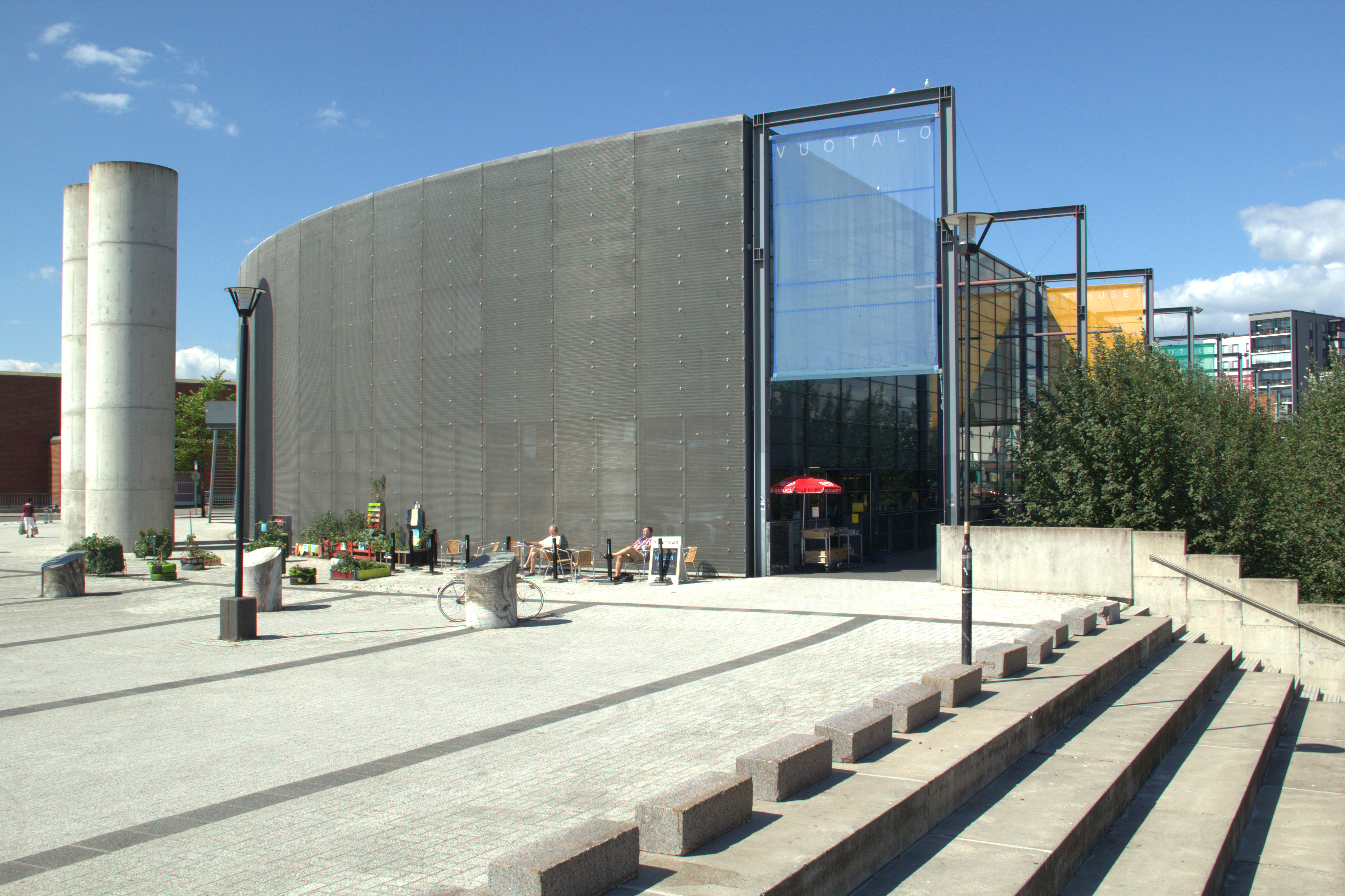 Vuotalo, Helsinki.